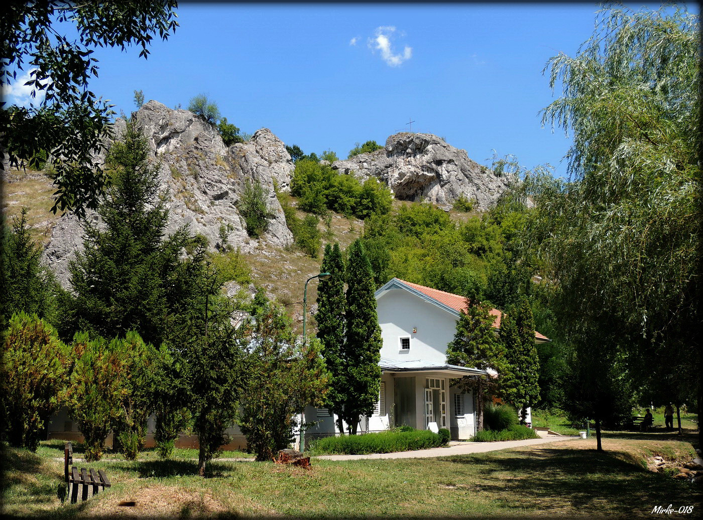 Бања Топило